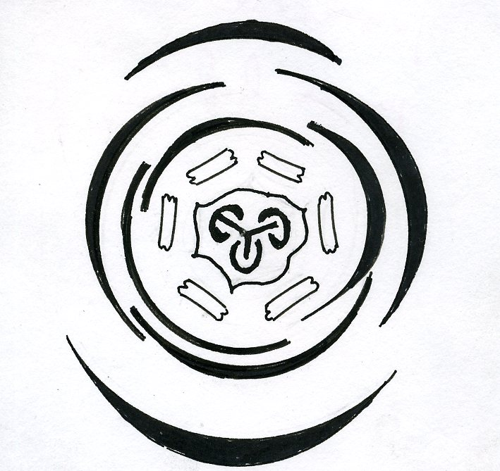 Bloemdiagram Juncus, Juncus floral diagram